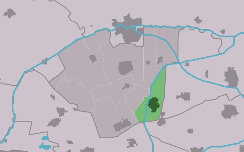 Kaartsje fan himrik fan De Westereen